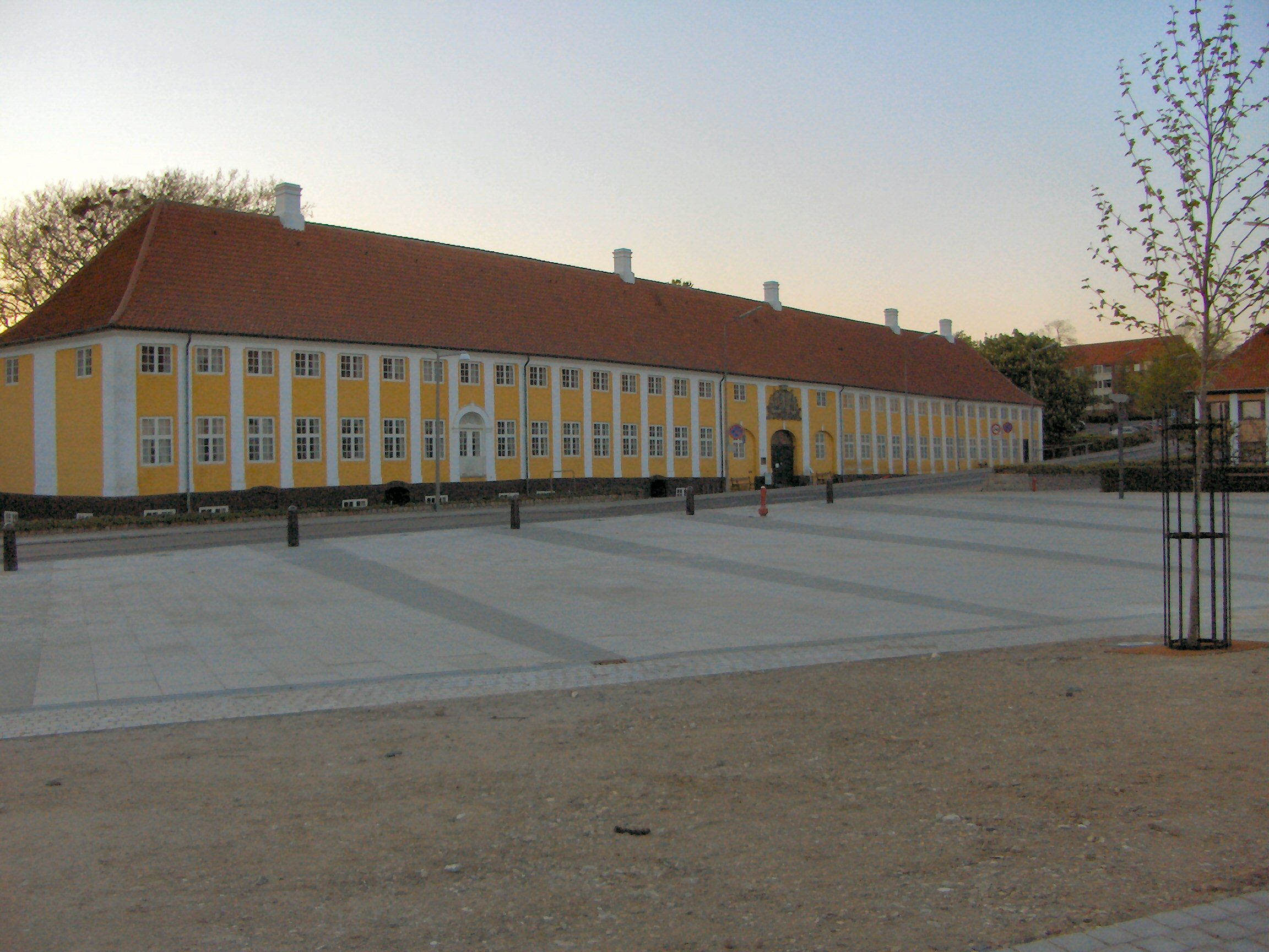 Kaalund Kloster i Kalundborg